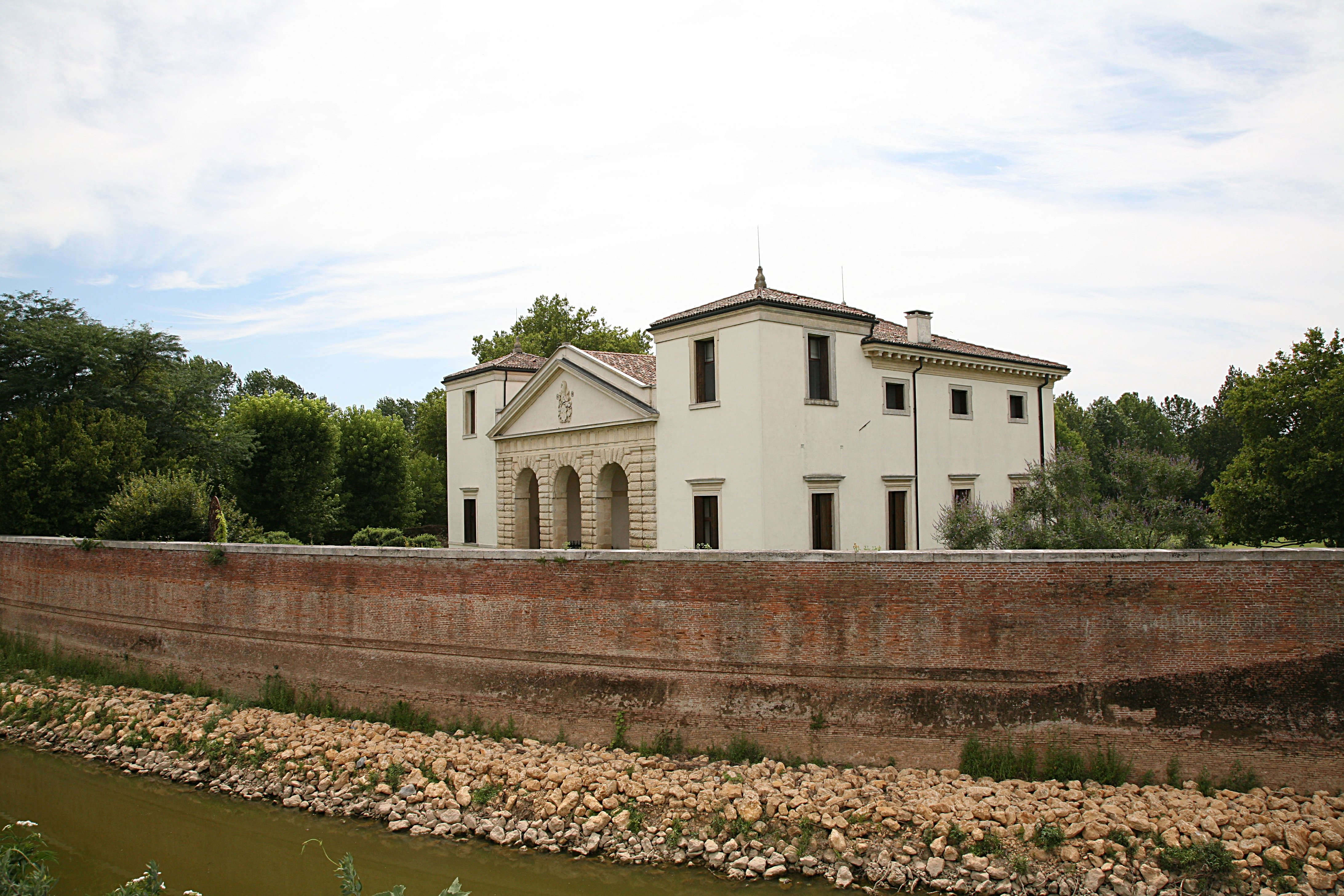 Villa Pisani at Bagnolo di Lonigo by Andrea Palladio